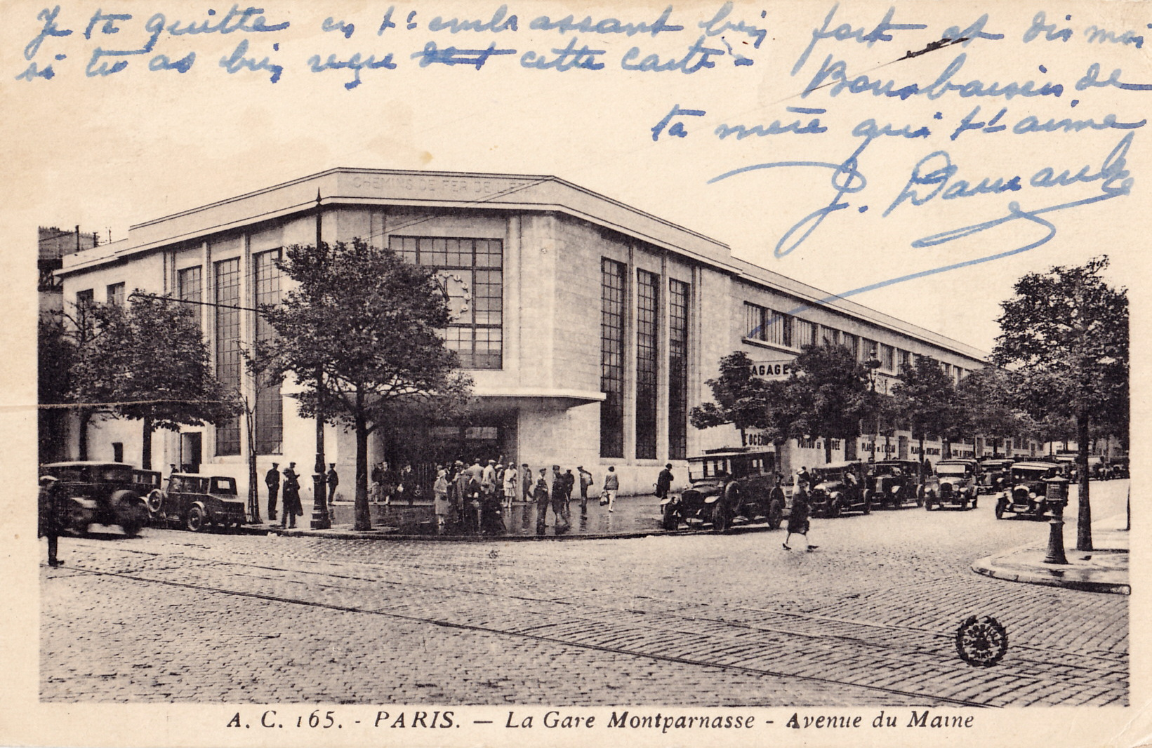 Carte postale ancienne éditée par Abeille - AC 165 :La Gare Montparnasse - Avenue du Maine